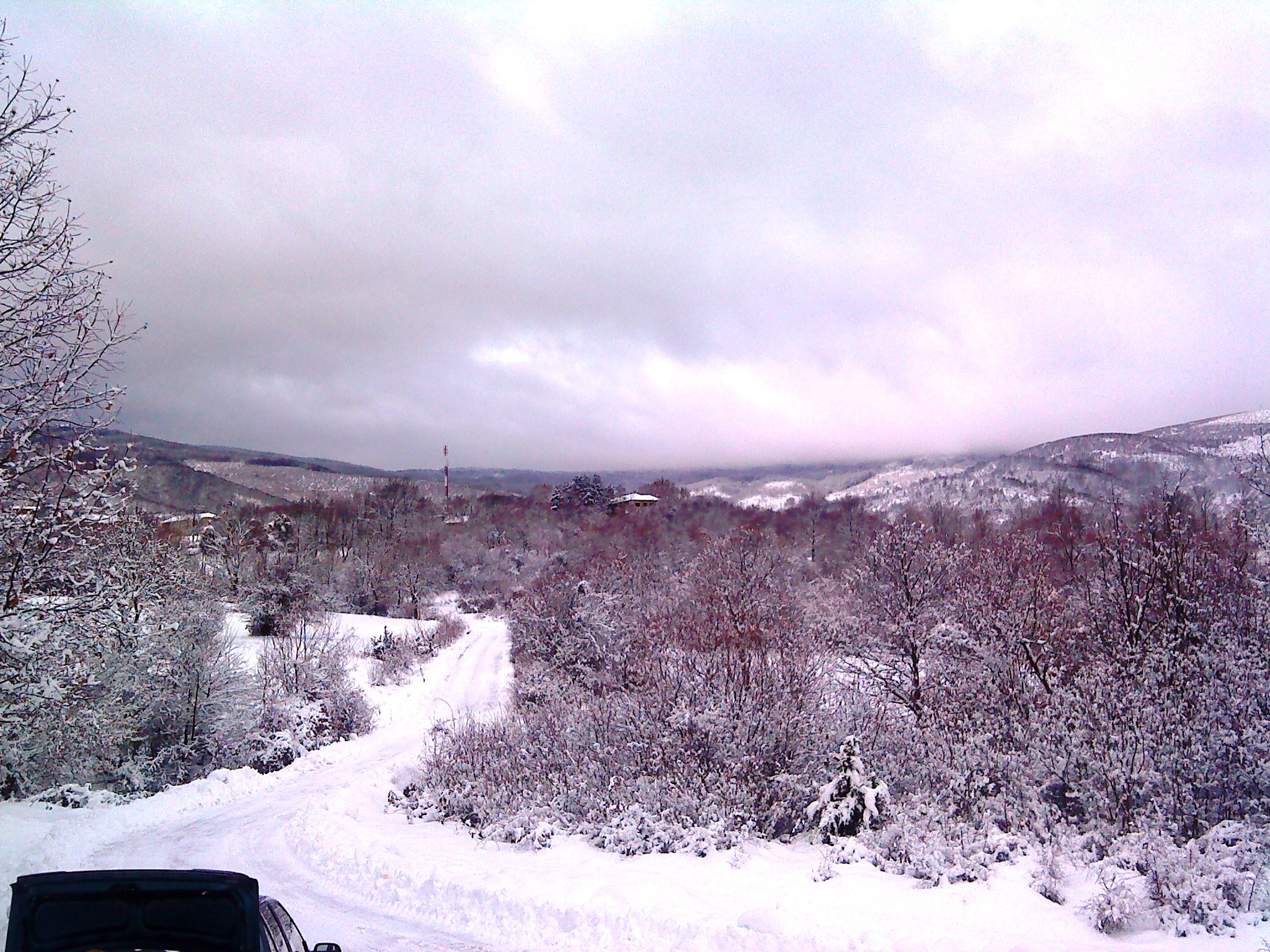 Село Ѓавато - зимски пејсаж